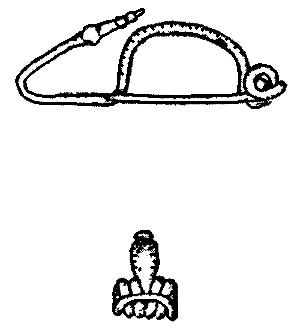 Schematische Darstellung einer Fibel im Frühlateneschema - der Fuß ist in einem weiten Bogen zurück zum Bügel geführt und endet in kugelförmigen Zierelementen.